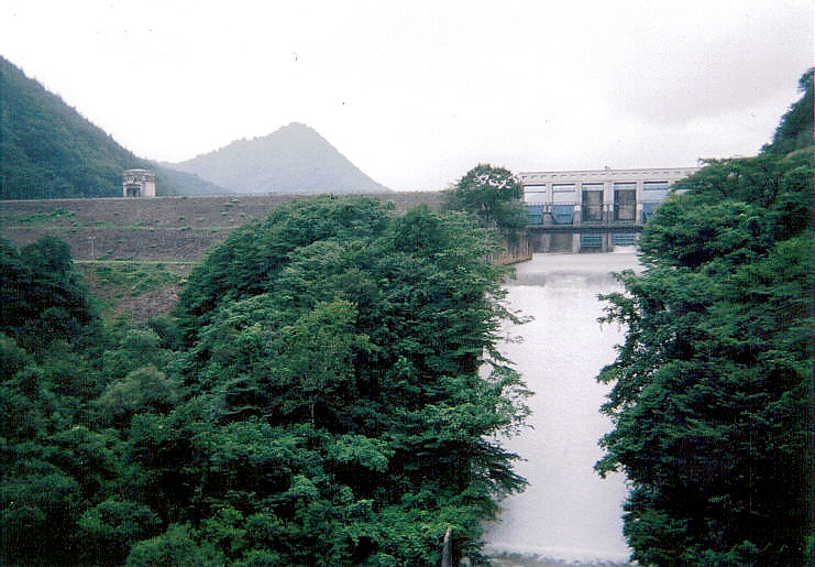 Dam